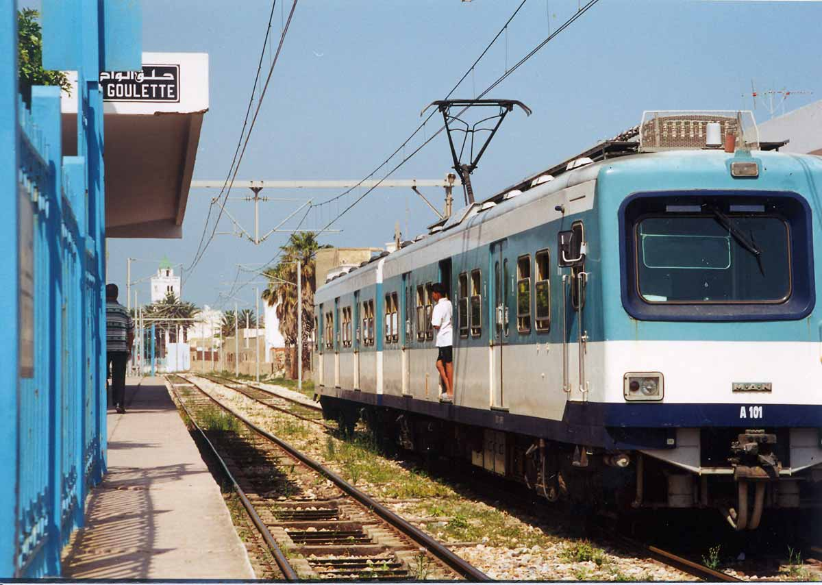 Gare de La Goulette - juin 2001 Collection personnelle Bertrand Bouret